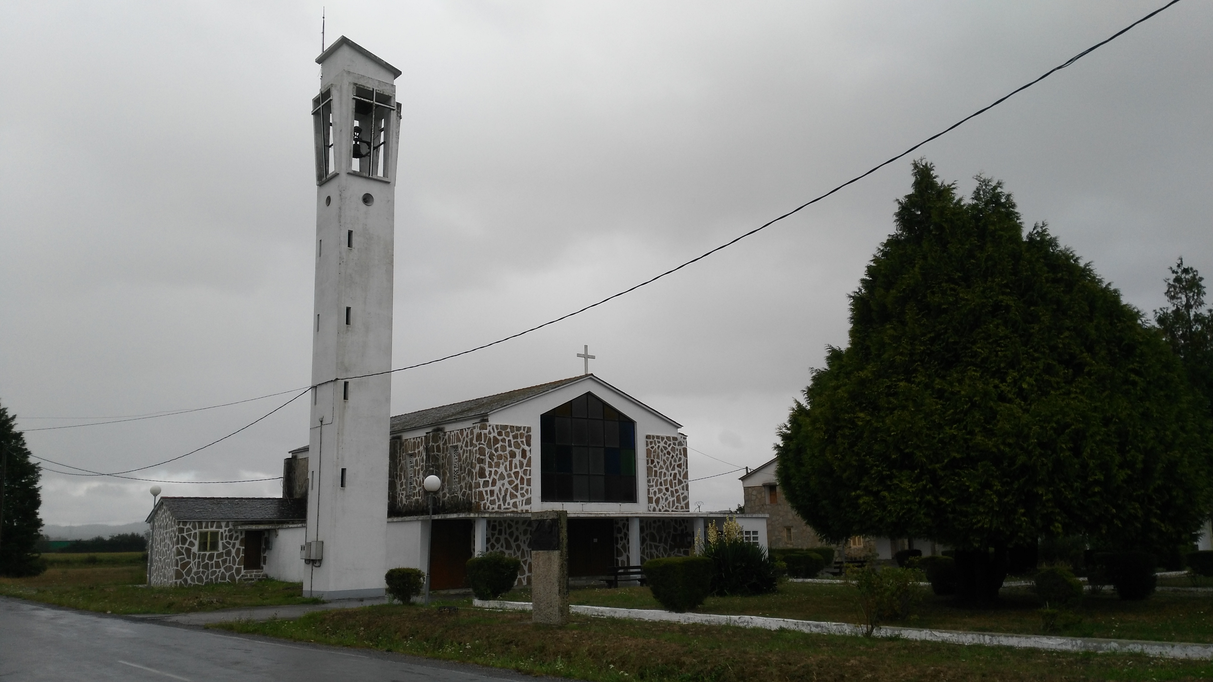 Igrexa do Matodoso na parroquia de Triabá, Castro de Rei